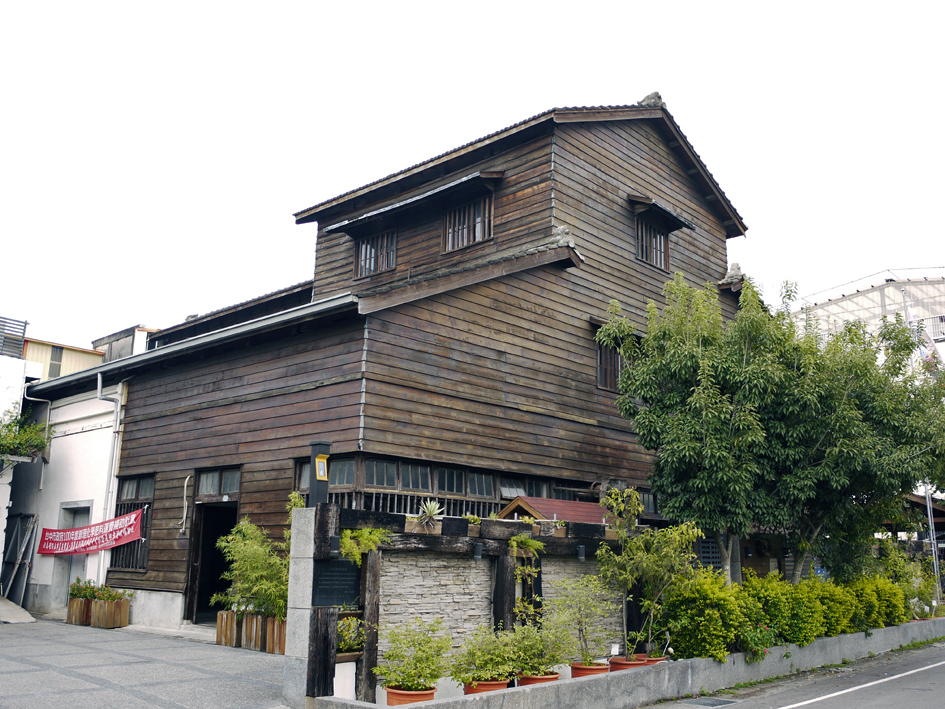 中文（台灣）: 臺中市石岡區農會碾米穀倉。